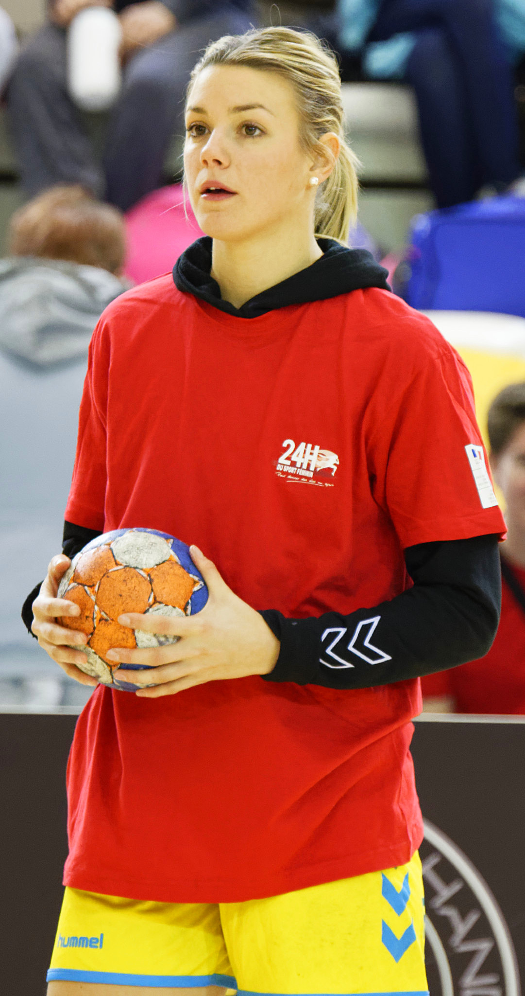 Rencontre de la 12e journée de LFH entre Issy Paris Hand et Toulon st Cyr Var. A Issy-Les-Moulineaux, le 25 janvier 2015.